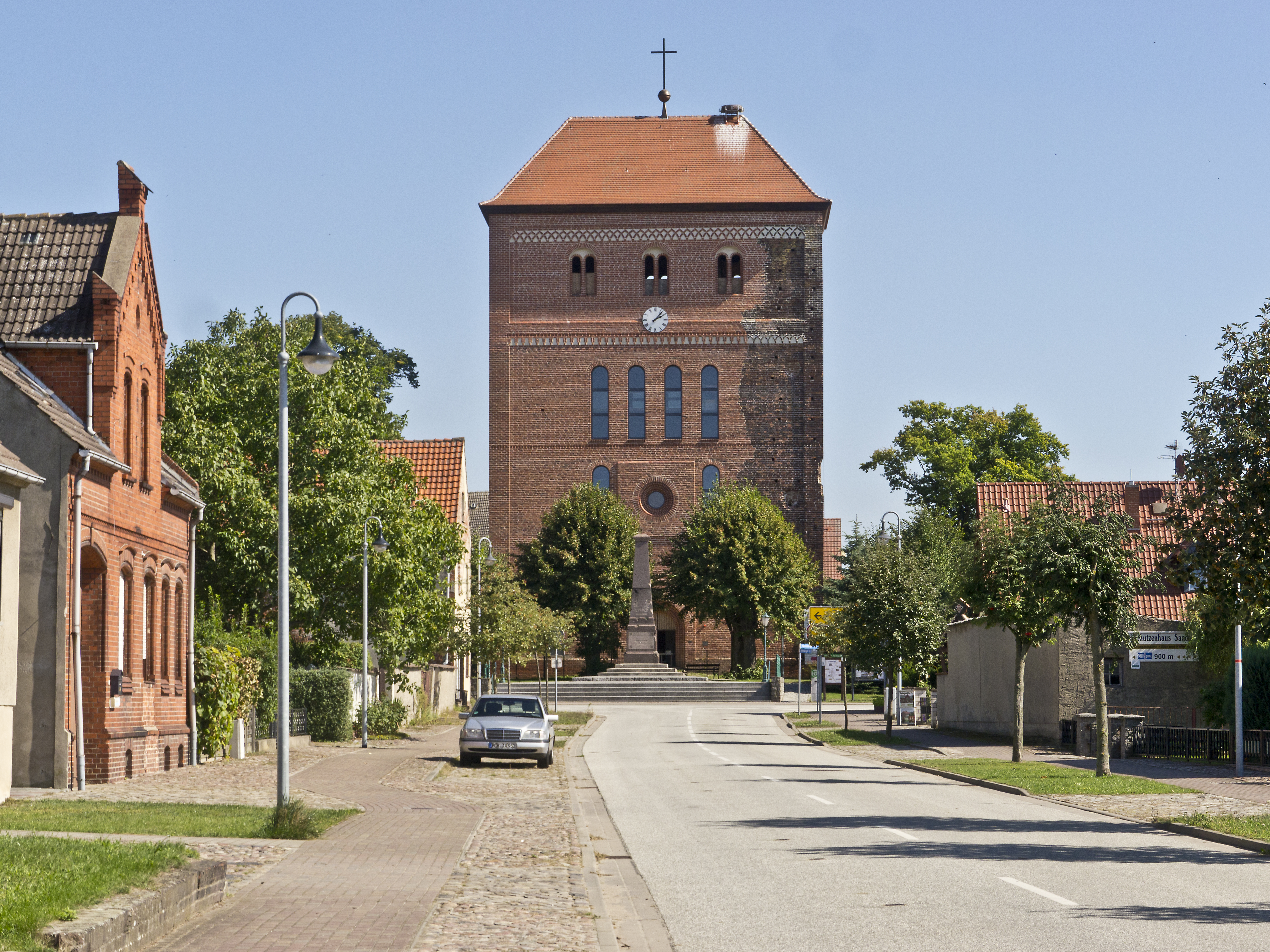 Stadtkirche St.Laurentius in Sandau an der Elbe, rekonstruierter Turm.